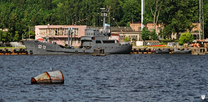 Pływająca stacja demagnetyzacyjna SD-13 na tle Brzegowej Stacji Demagnetyzacyjnej. Na pierwszym planie beczka poligonu demagnetyzacyjnego. Gdynia. 15 VIII 2004r.